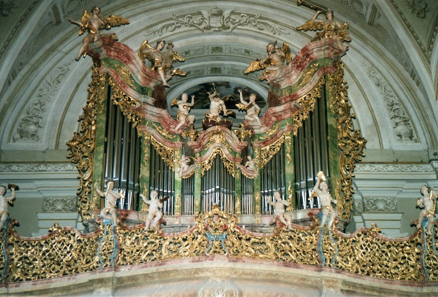 Quelle: selbst fotografiert im August 2000